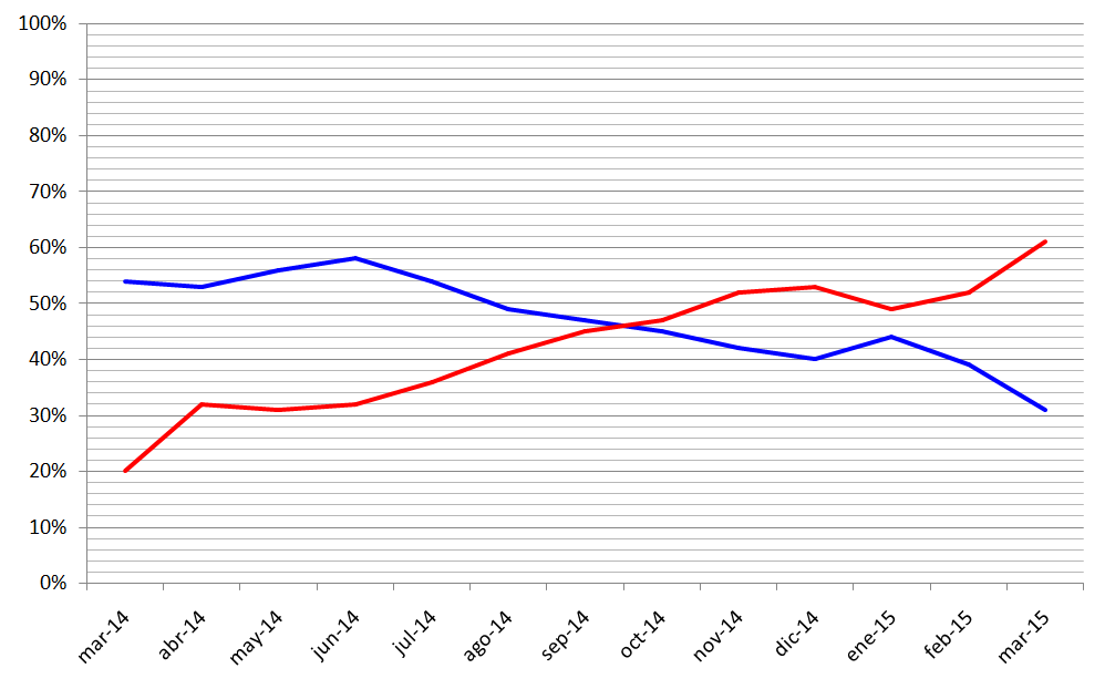 Gráfico con los resultados de aprobación (azul) y desaprobación (rojo) del segundo gobierno de Michelle Bachelet, según datos obtenidos por la encuesta Adimark.